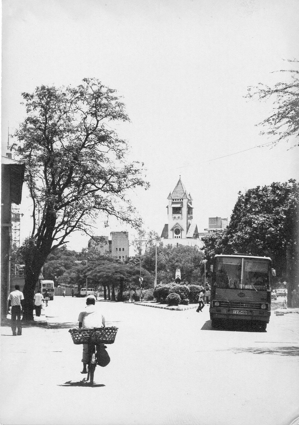 Dar es Salaam street in 1980